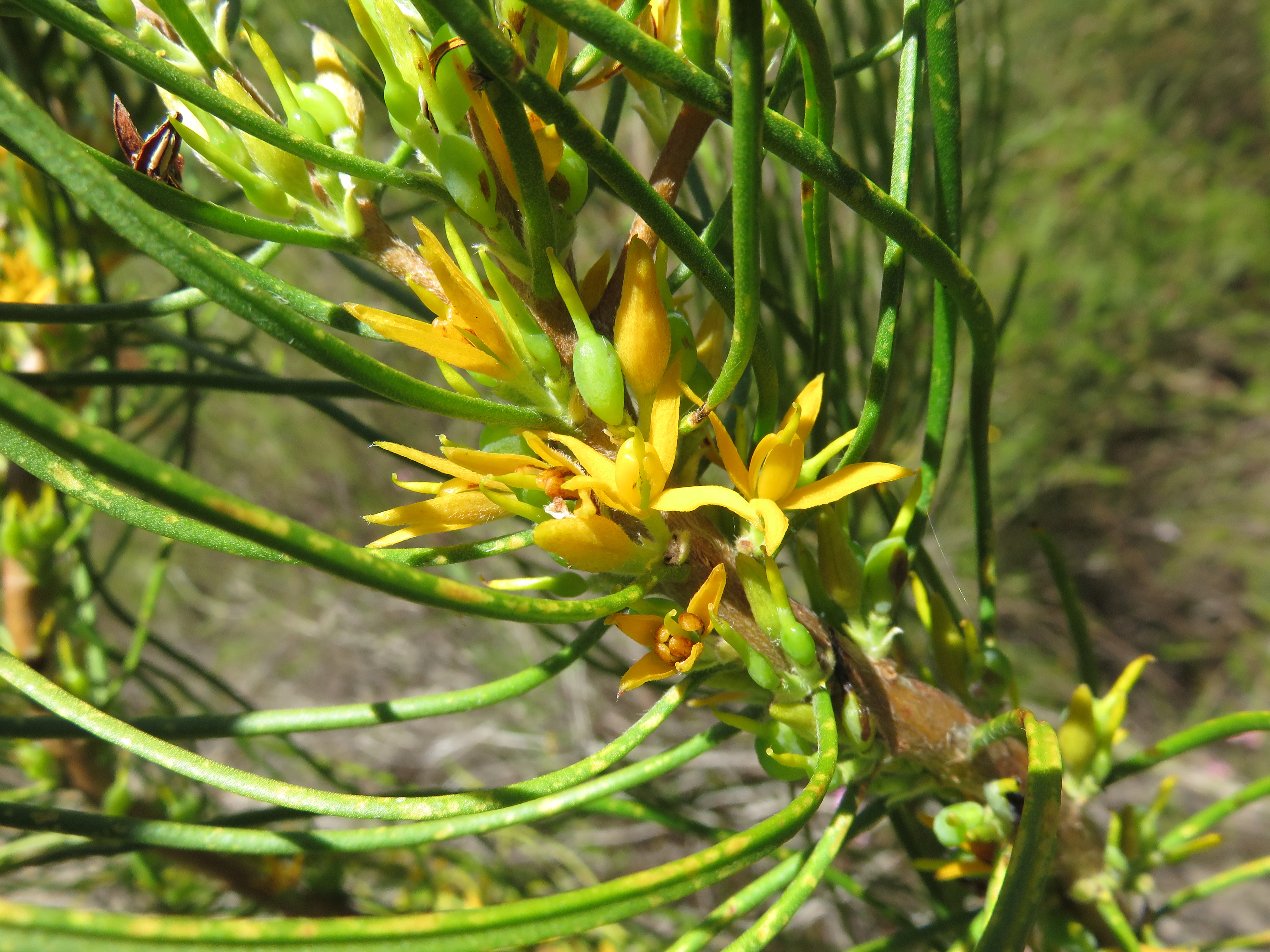 Acidonia microcarpa au Lac Jasper, Parc National d'Entrecasteaux.